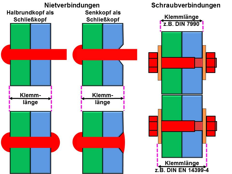 Grafische Darstellung zur Definition der Klemmlänge bei Niet- und Schraubverbindungen.